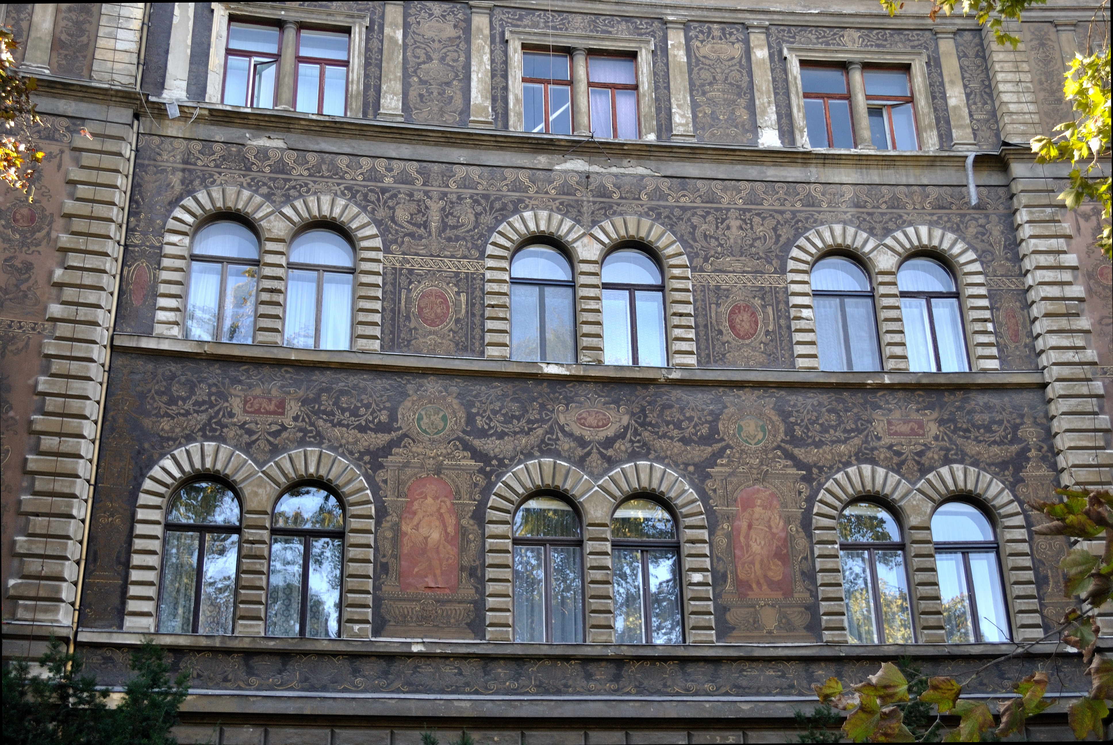 Ház (Budapest 6, Andrássy út 88-90., Aradi utca 47-51., Szinyei Merse Pál utca 2., Kodály Zoltán körönd 1.) This is a photo of a monument in Hungary, Identifier: 721